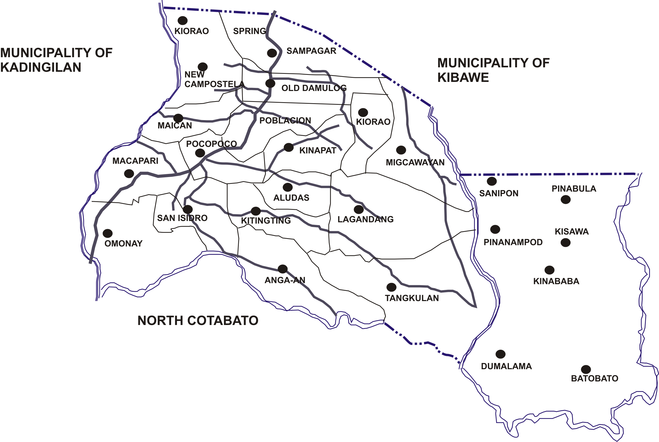 Political map of Damulog, Bukidnon